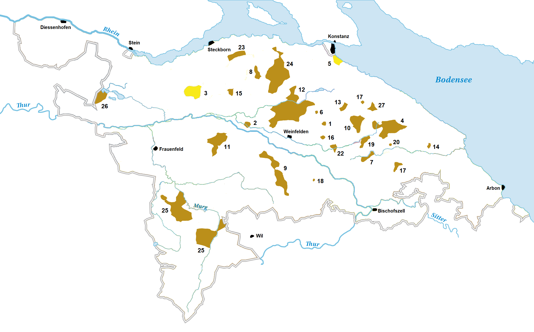 Die Hohen Gerichte der Landgrafschaft Thurgau in der Mitte der 18. Jahrhunderts. Nach Pupikofer, 1861